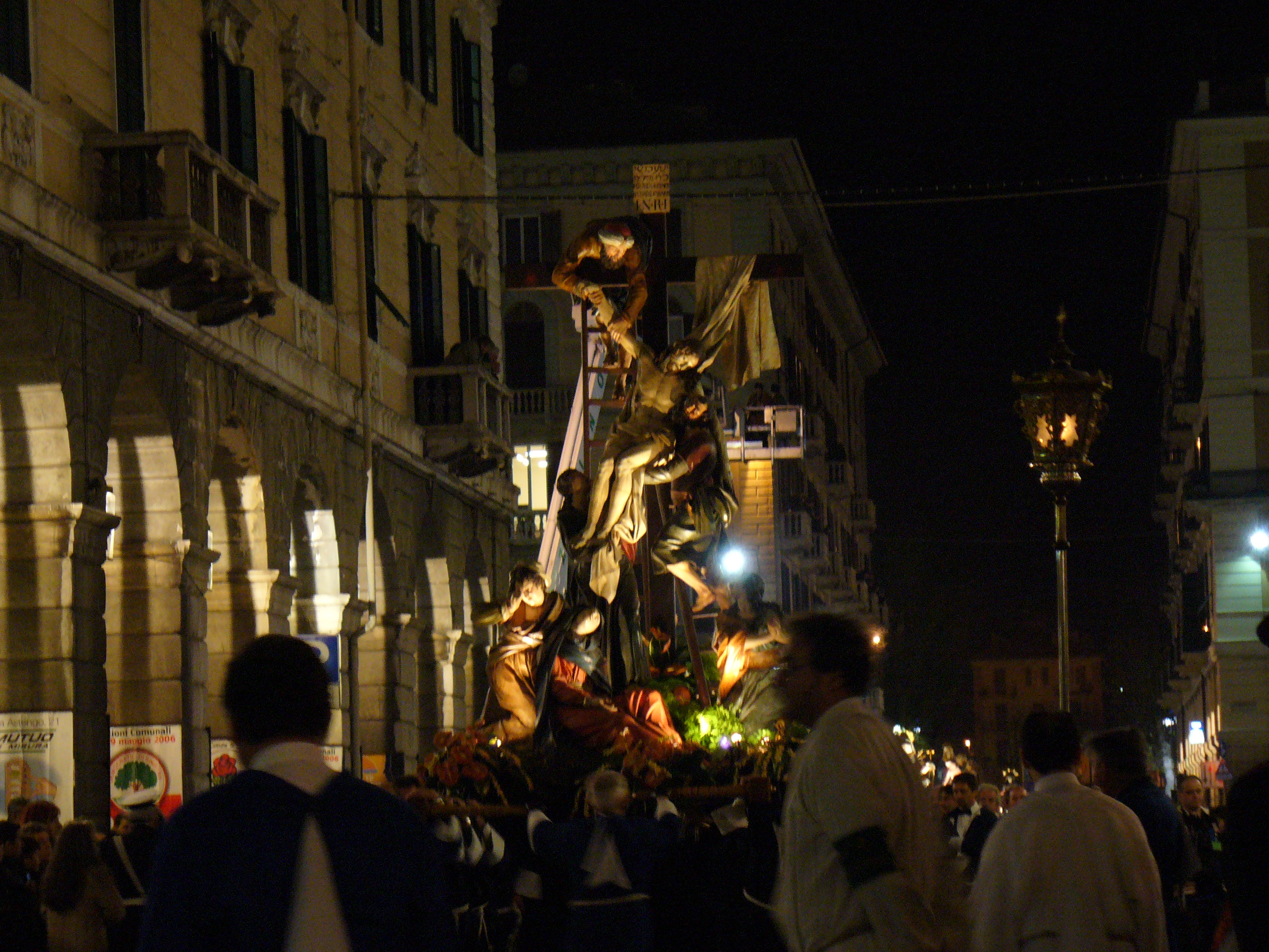 la deposizione dalla croce di Filippo Martinengo del 1795